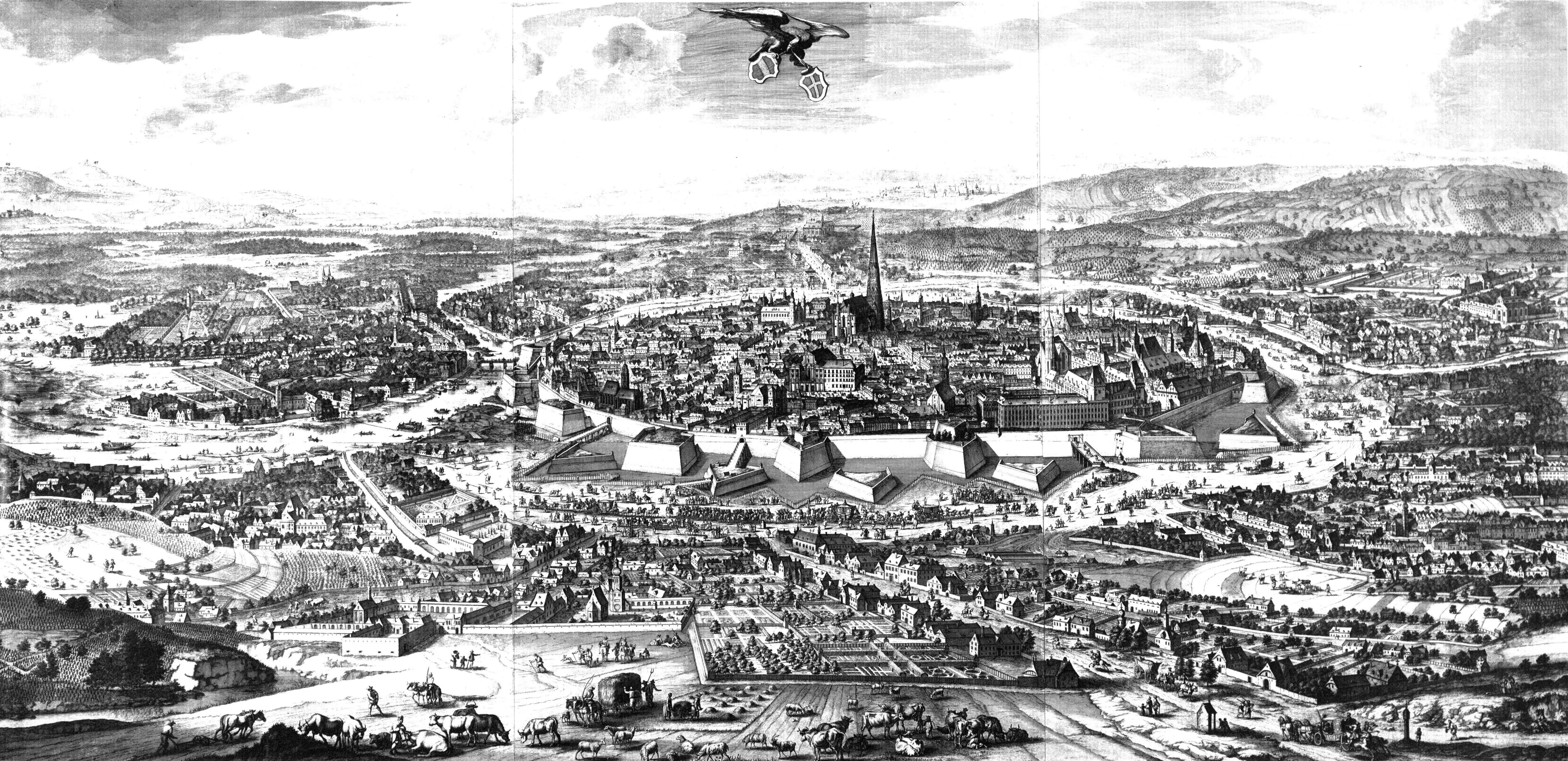 Vogelschau der Stadt Wien und Umgebung von Nordwesten, entstanden vor der Belagerung durch die Türken 1683, von einem überhöhten Standort etwa zwischen heutiger Währinger und Alser Straße aus, nicht ganz realitätsgetreu; Kupferstich auf 6 Blättern, Druck 1686 (verkleinerte Reproduktion und Druck durch die MA 20 - Plan- und Schriftenkammer, zirka 1978)